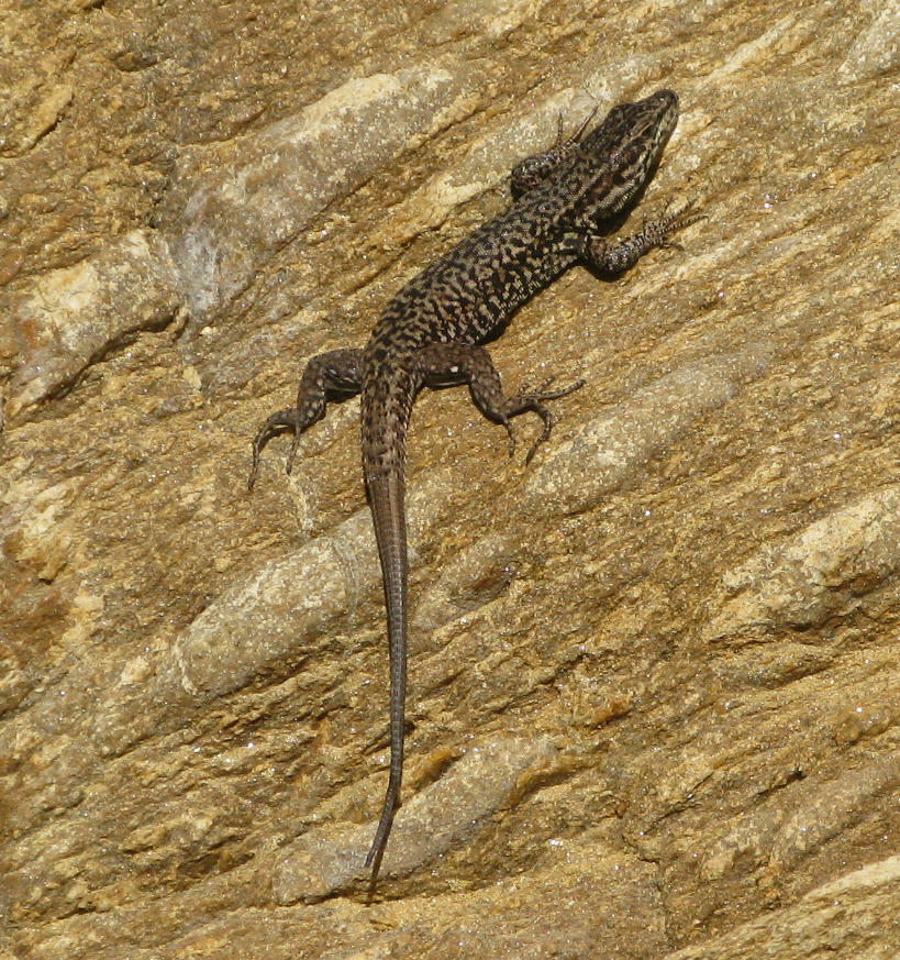 Lézard des murailles (podarcis muralis), île du Levant.